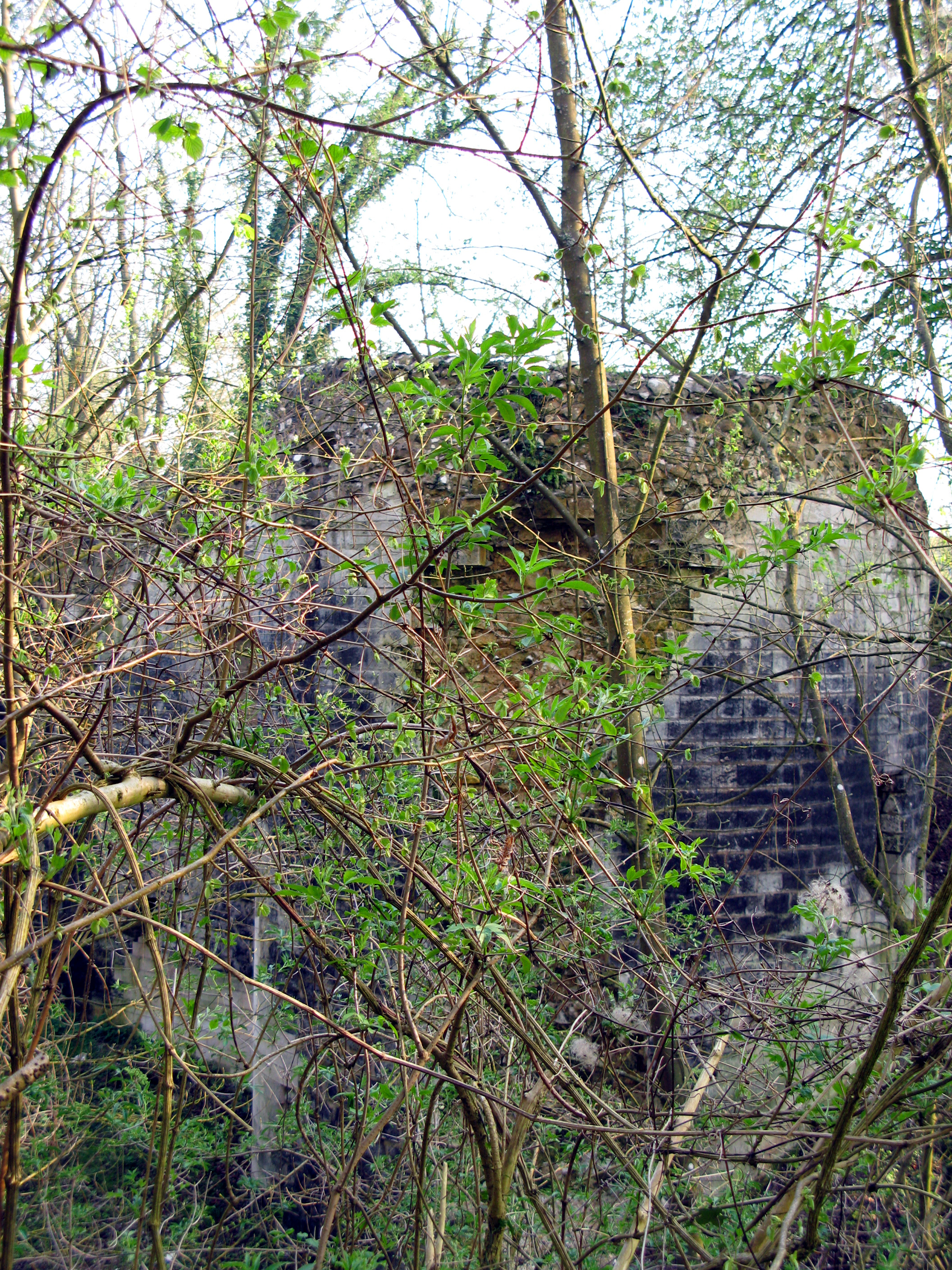 Lucheux (Somme, France) Tour ronde du château en bordure du fossé. Des arbustes envahissent partiellement le fossé du château (en avril 2007) et cachent complètement ce vestige de tour en été.